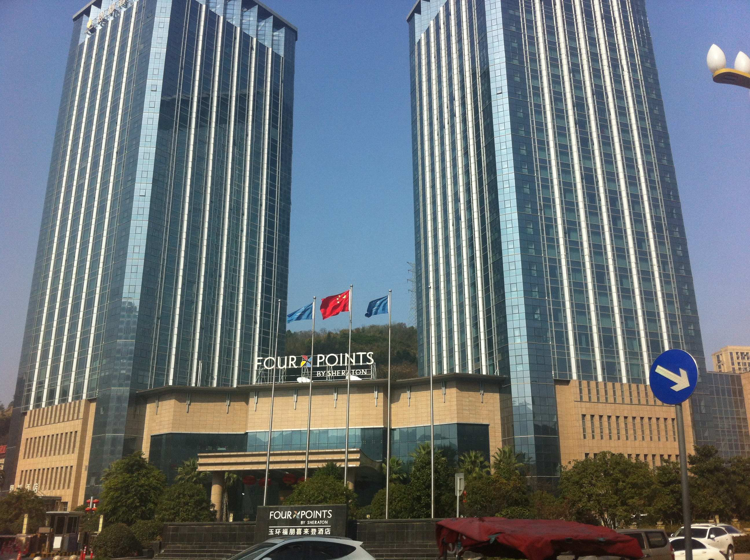 中文（中国大陆）: 台州玉环福朋喜来登酒店大门